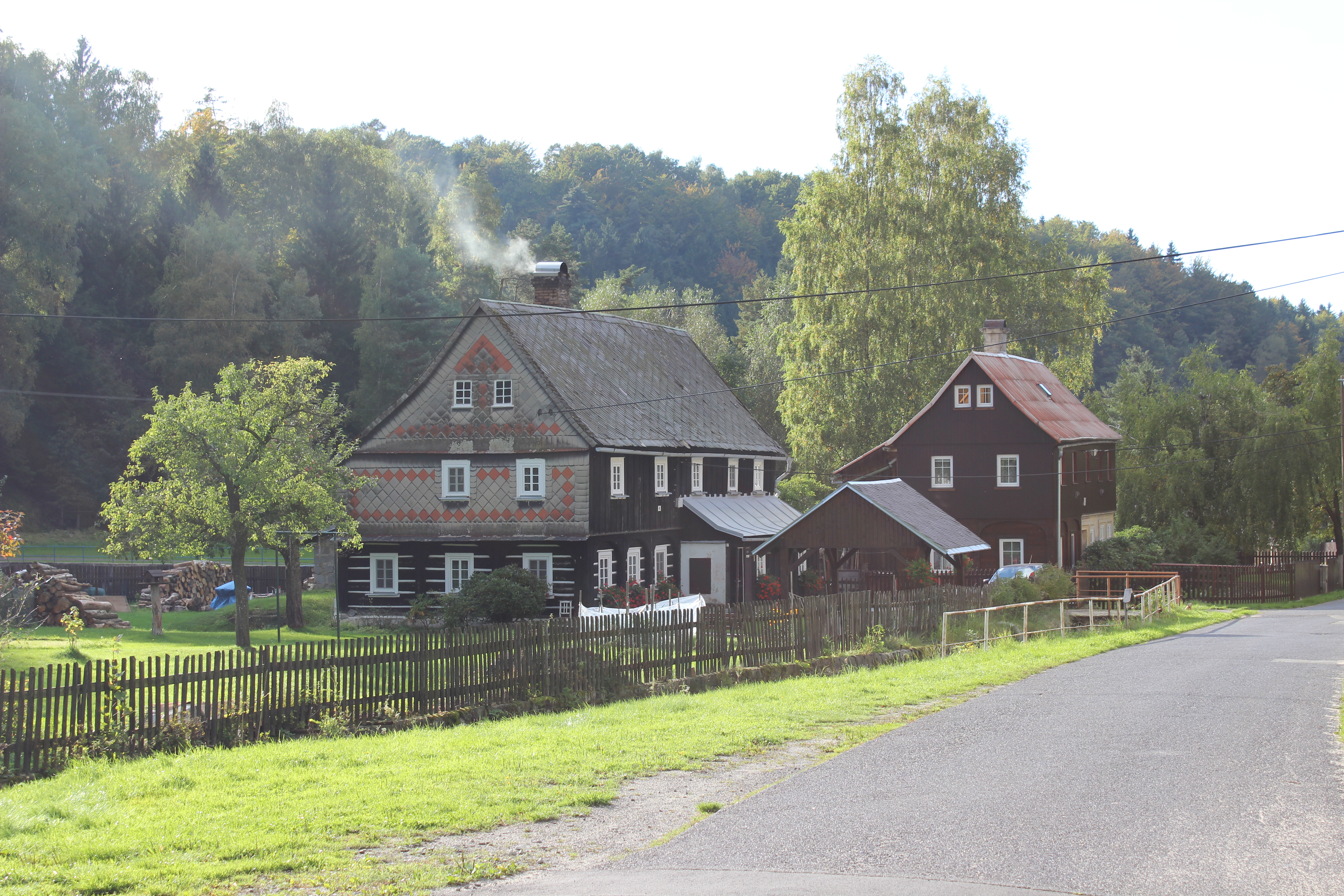 Dům evidenční číslo 43 v Horním Prysku.